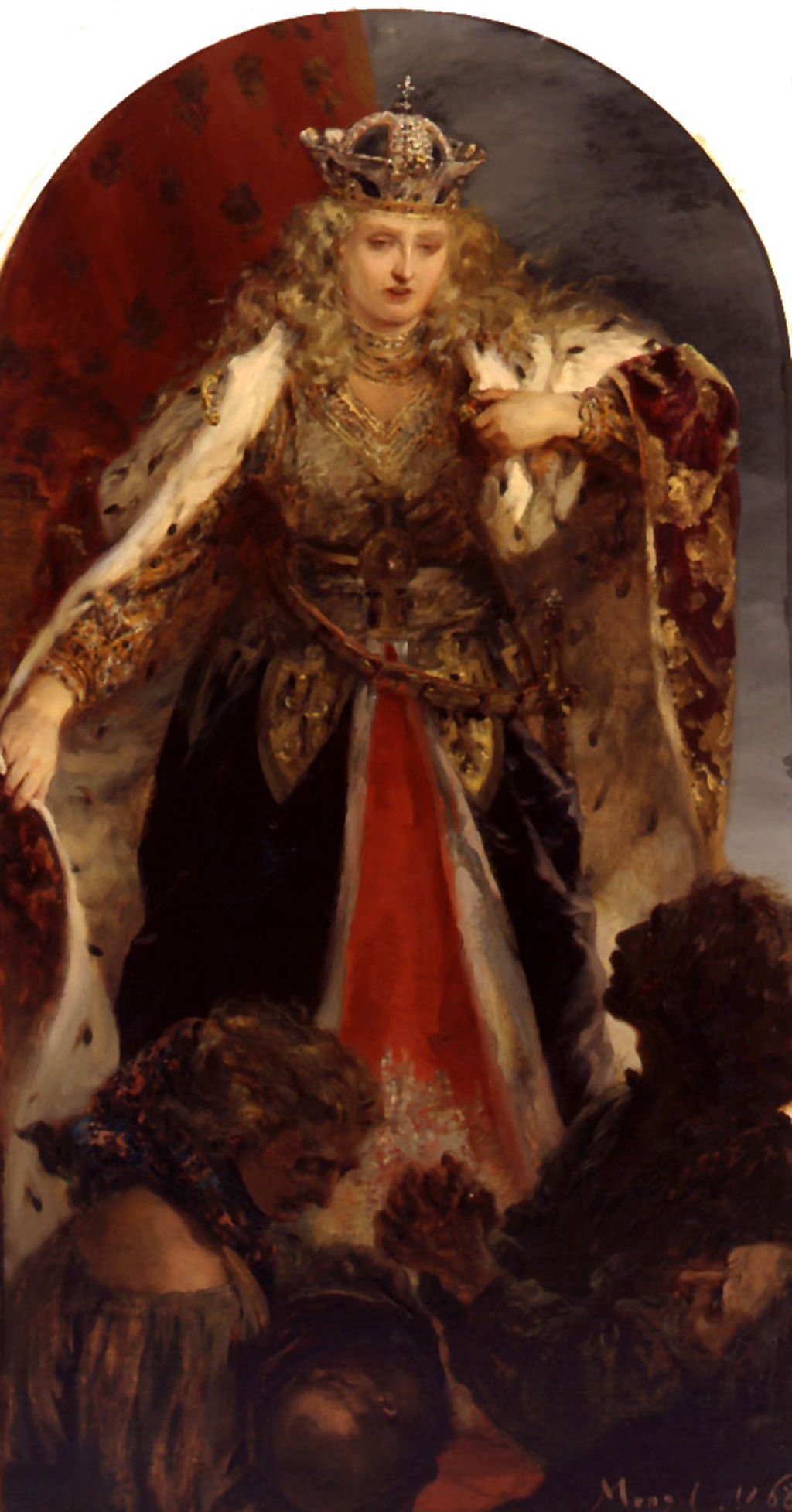 Dieses Gemälde von Adolph Menzel war Teil eines Wohltätigkeitsbazars für die Notleidenden in Ostpreußen. Nicht eine waffenstarke Allegorie, sondern eine schützende Borussia stellt das Gemälde dar.